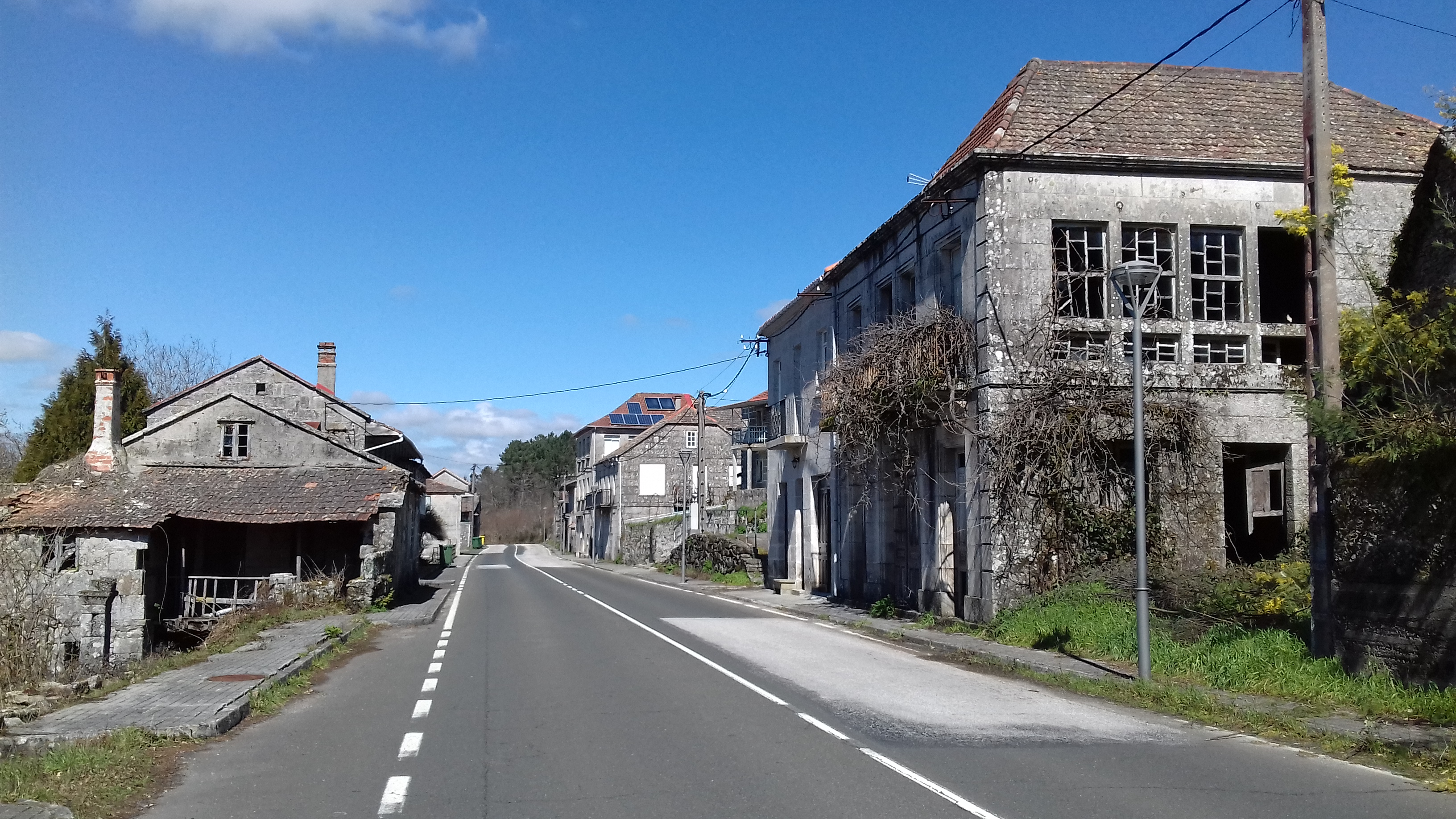 Dadín, O Irixo